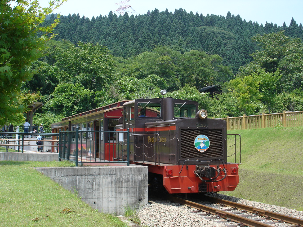 峠の湯